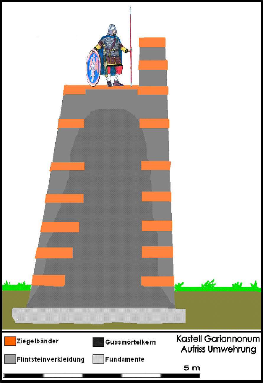 Aufriss der Umfassungsmauer des Kastells von Burgh Castle (GB)